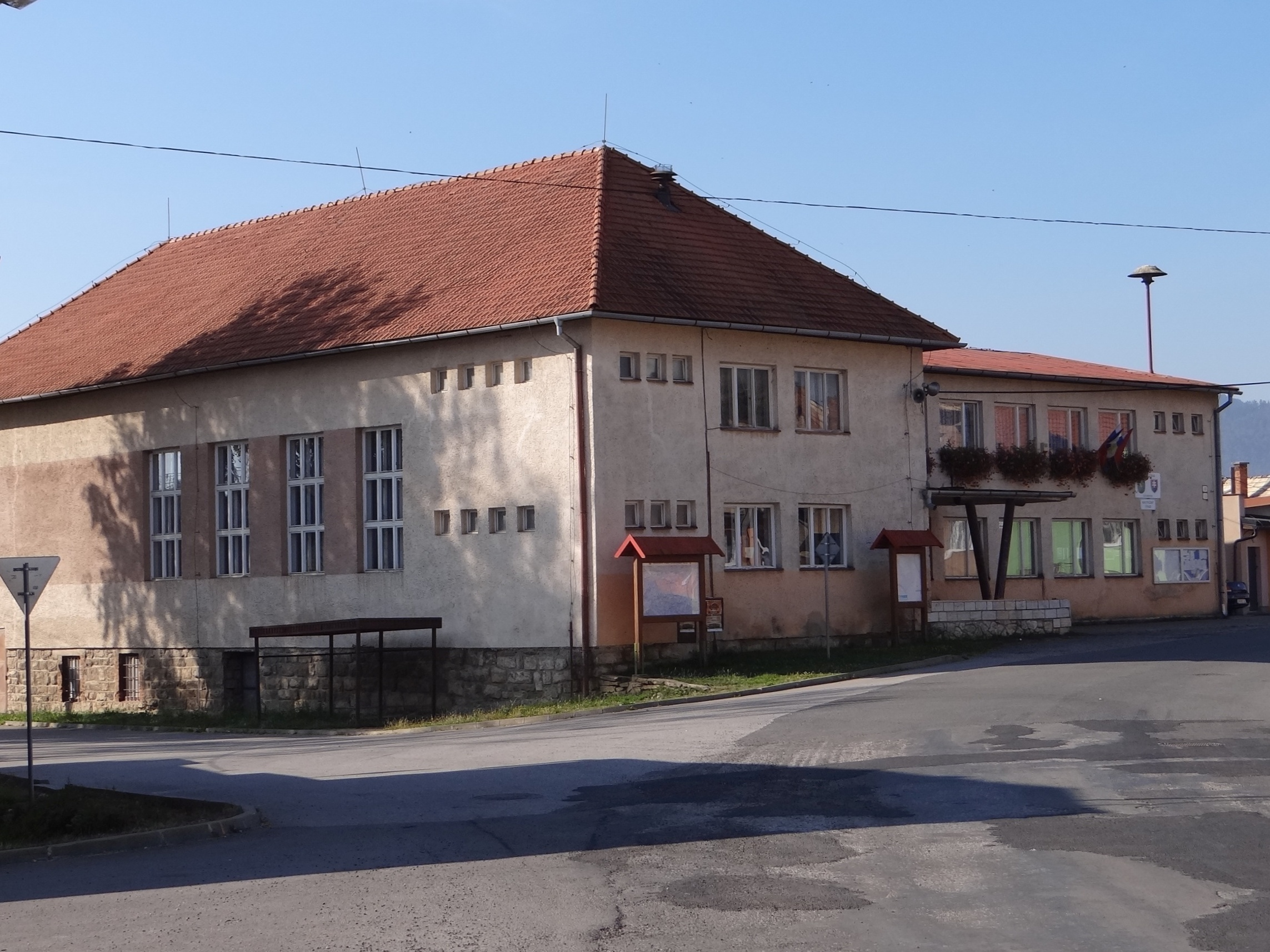 Letanovce